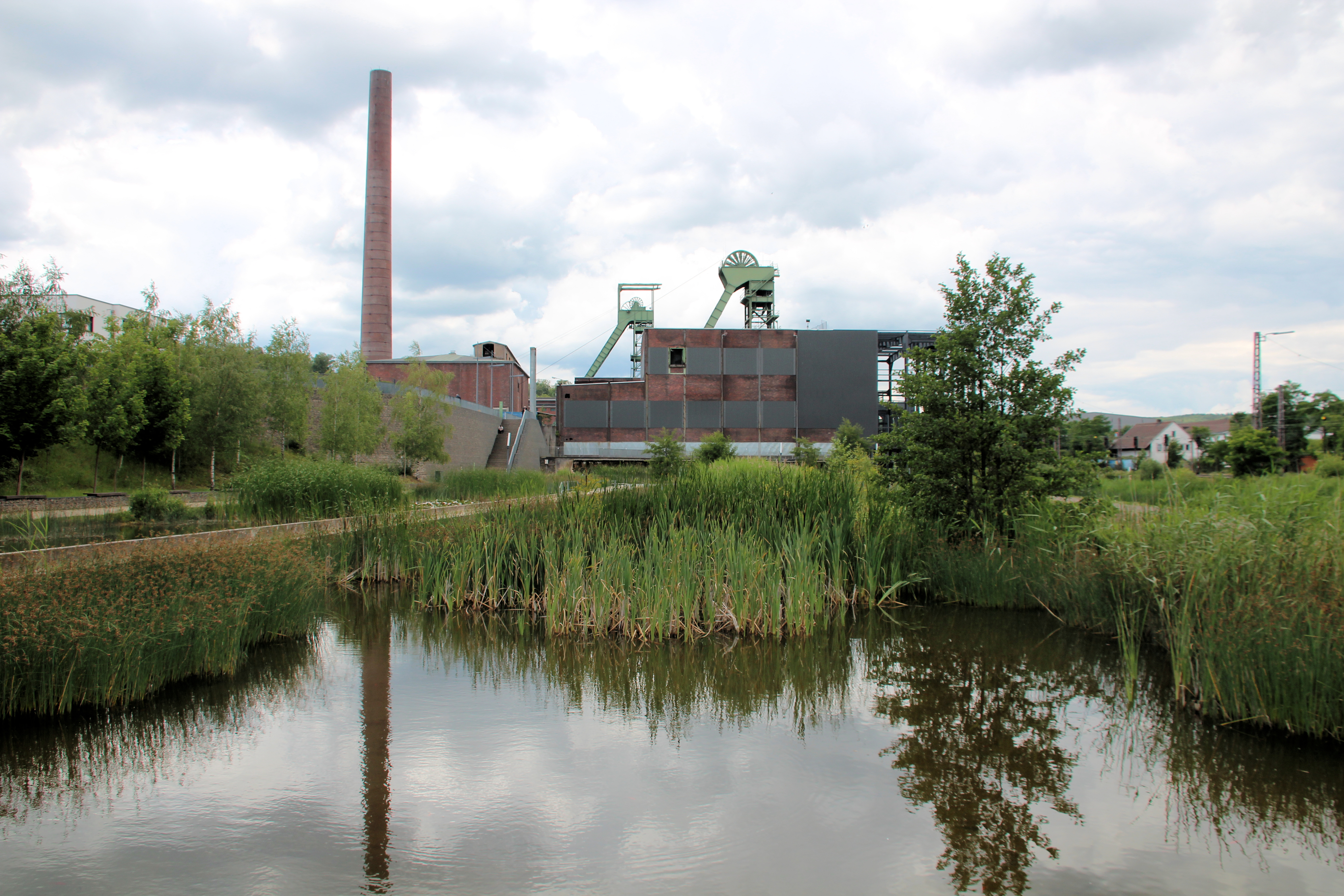 Wassergärten an der ehemaligen Grube Reden